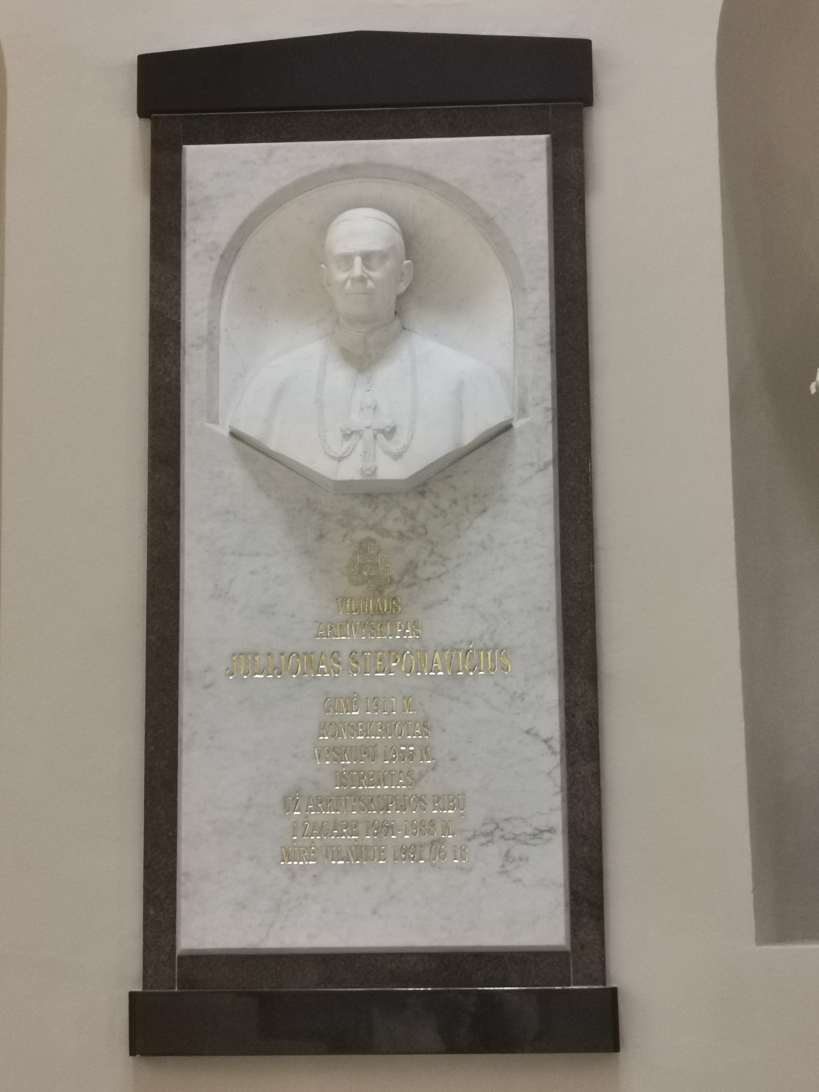 Epitafija vyskupui Julijonui Steponavičiui Tremtinių koplyčioje